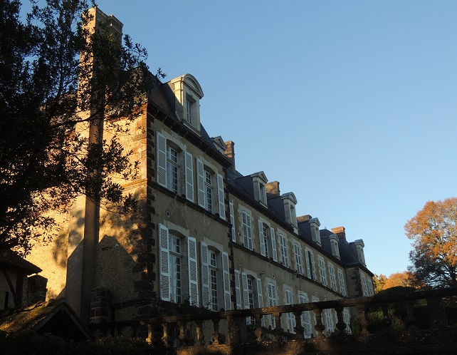 Château de Montmarin, facade avec les 2 ailes en saillie et la terrasse avec balustres